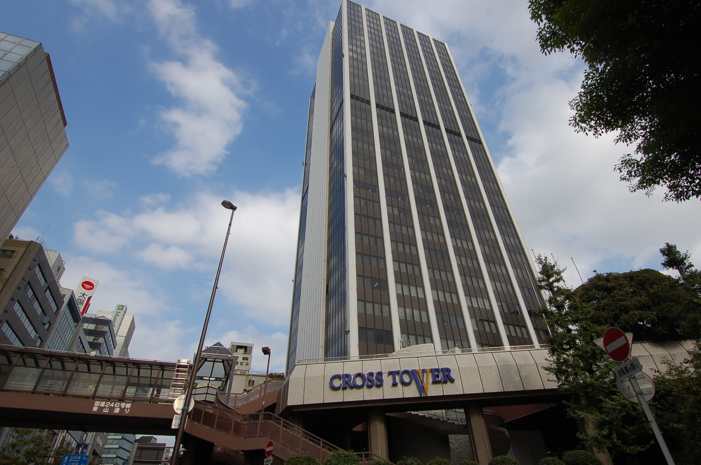 渋谷クロスタワー 外観